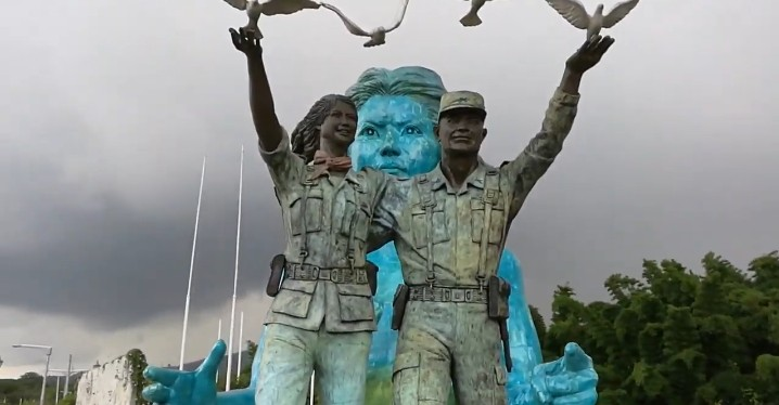 Monumento De La Reconcilacion